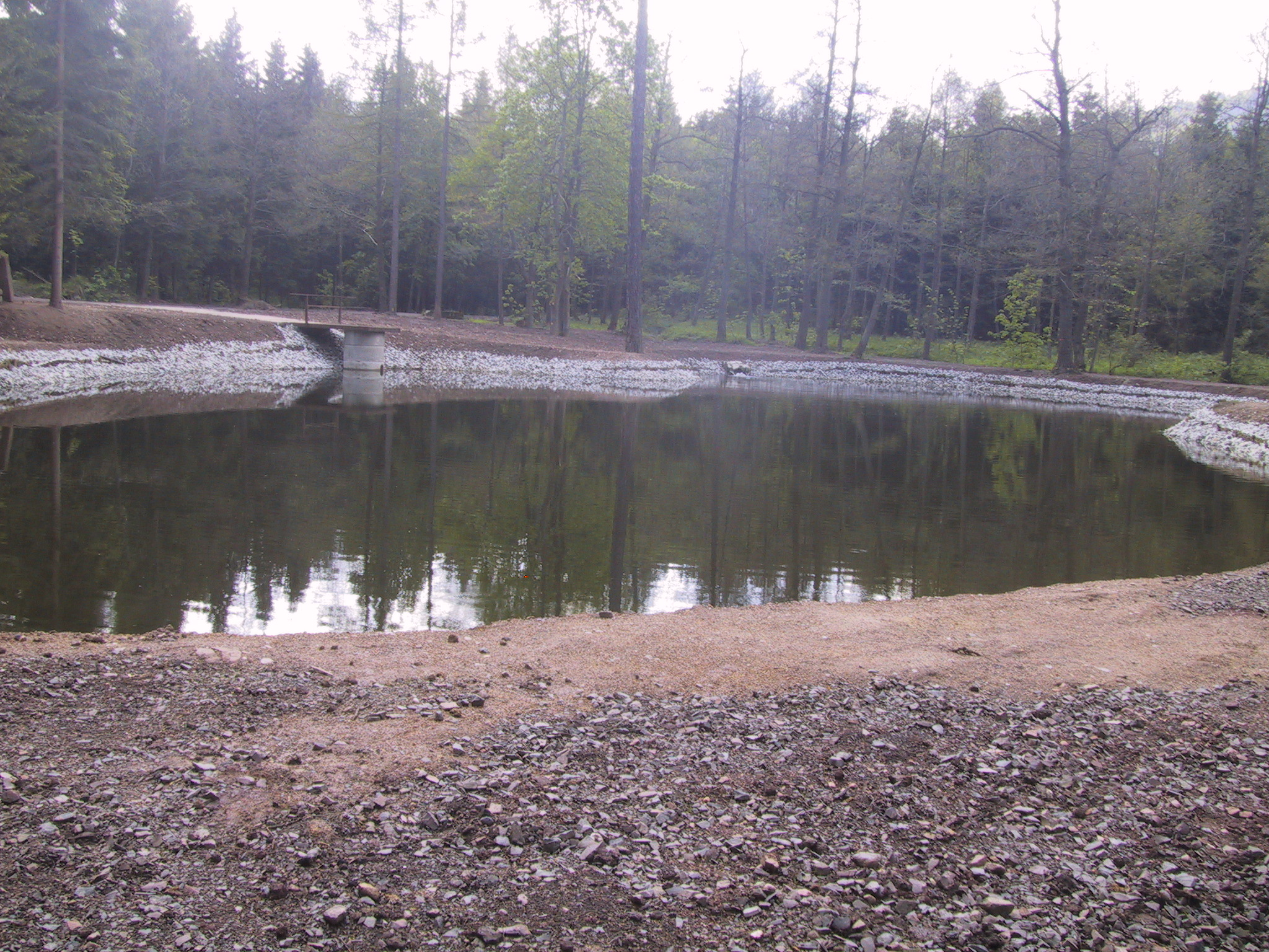 Sztuczny zbiornik w Kuźnicach Świdnickich